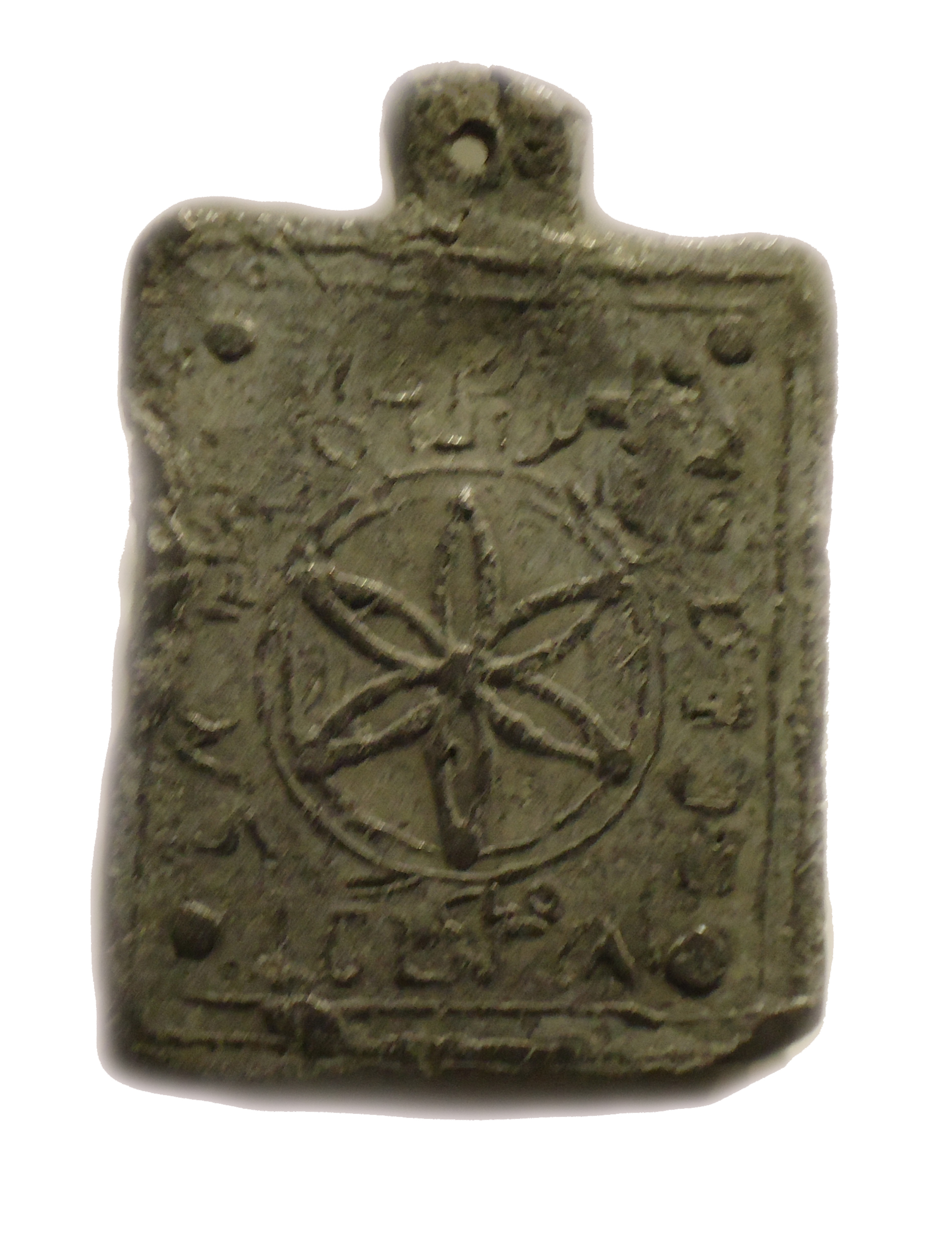 משקולת בר כוכבא, נמצאה ב-1987 בחורבת אלים על יד בית גוברין, פורסמה על ידי עמוס קלונר